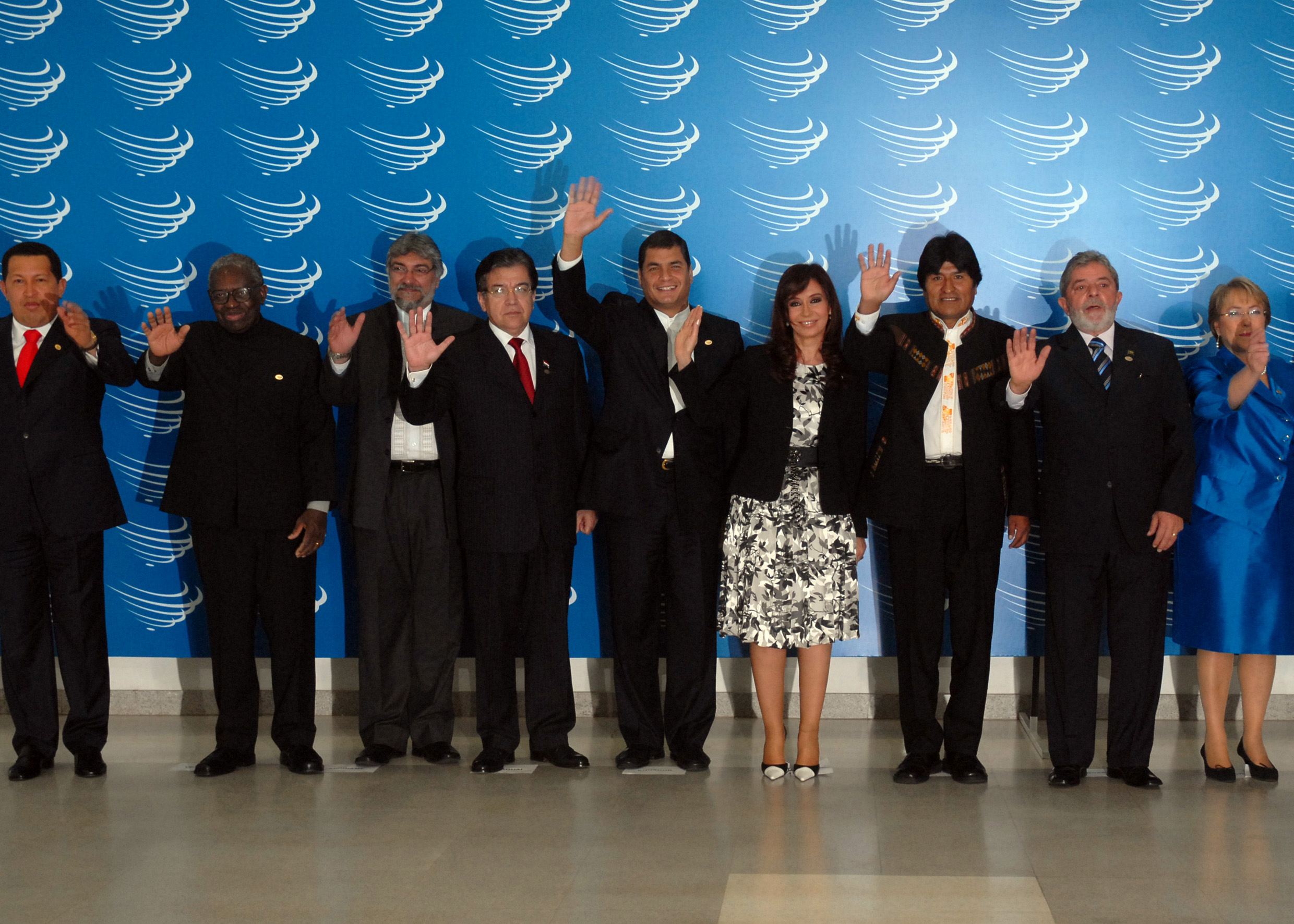 Brasília - Presidentes se reúnem durante União de Nações Sul-Americanas (Unasul). O encontro serviu para que os representantes assinem o tratado de constituição da organização, que existe apenas informalmente.